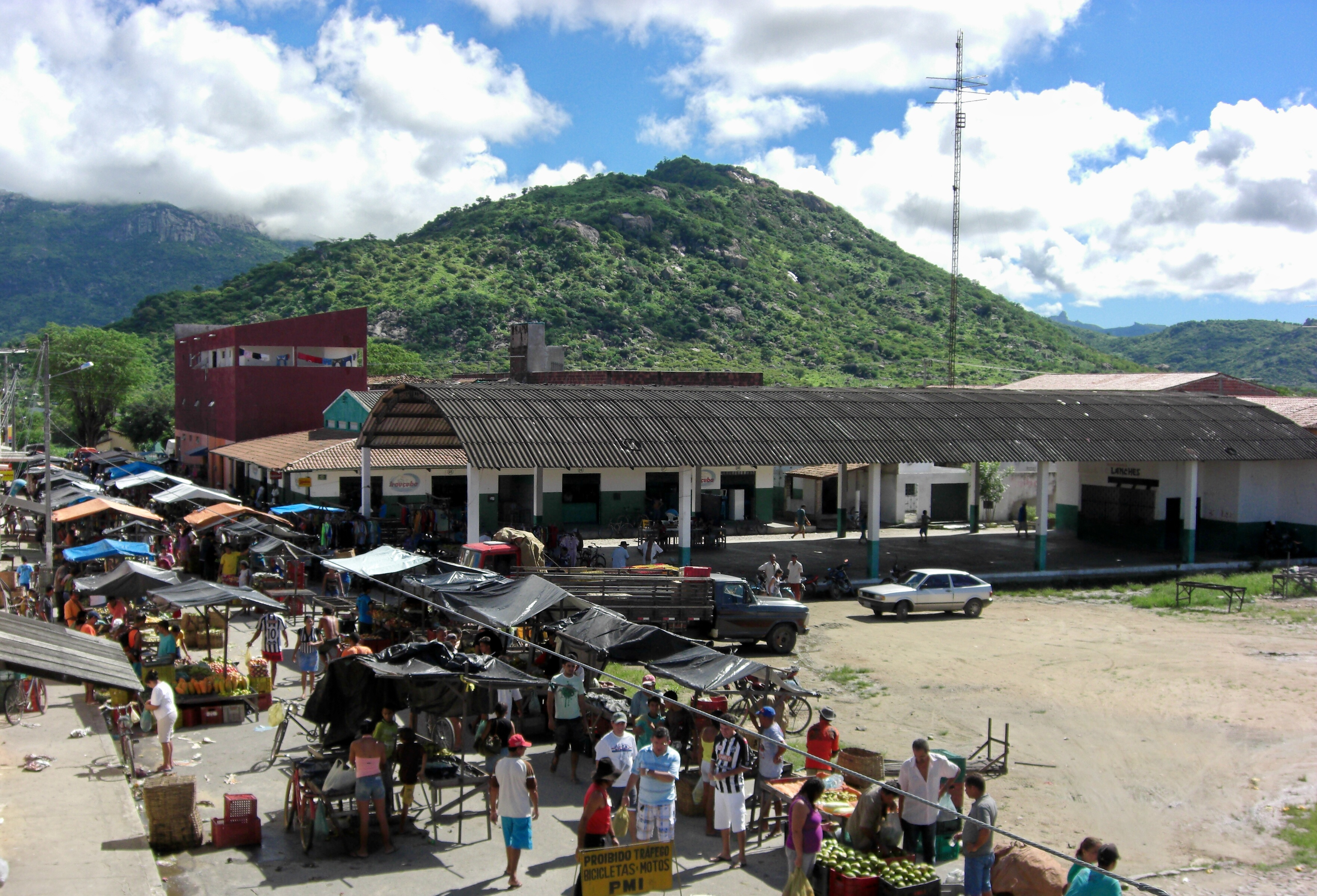 Feira de Irauçuba (aos domingos)